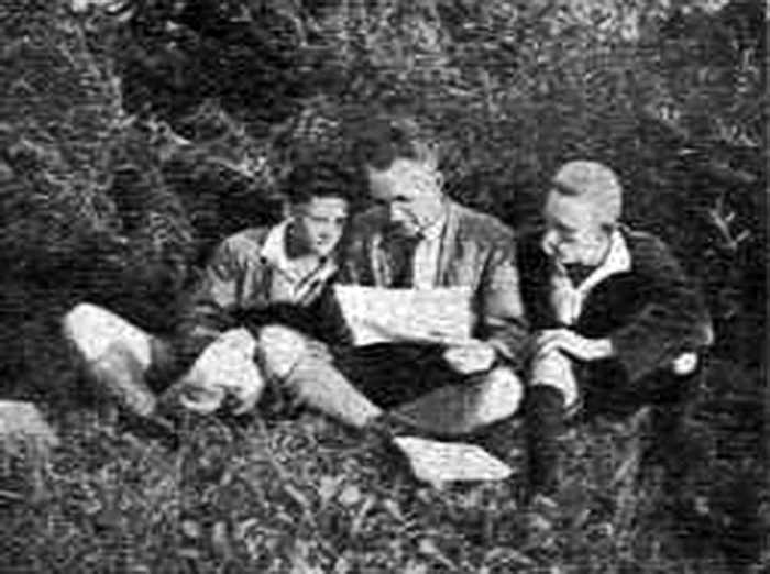 Hermann Platiel (centre) legas kun siaj lernantoj La Lernanton, kiu estas aldonata al Arbeiter-Esperantist (LEA-gazeto)